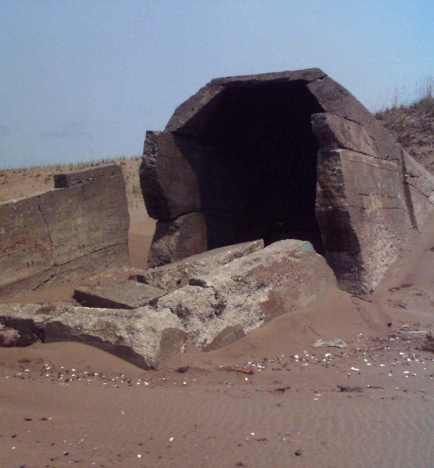 Бункер Красногорск